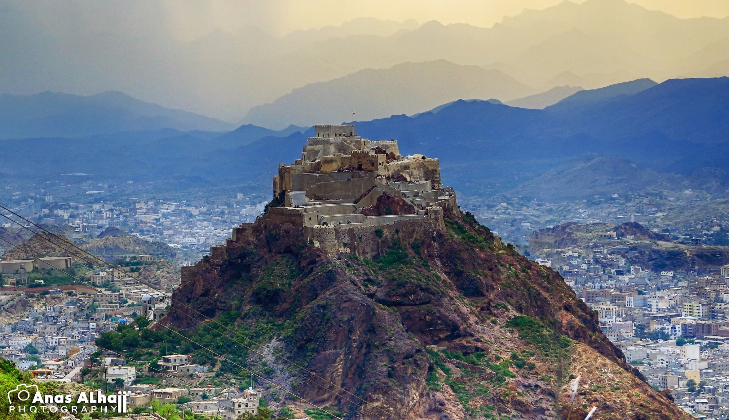 Tai'zz JABAL SABER